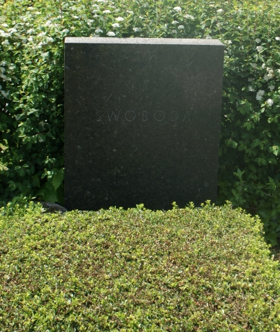 Wiener Südwestfriedhof-Helmut Swoboda